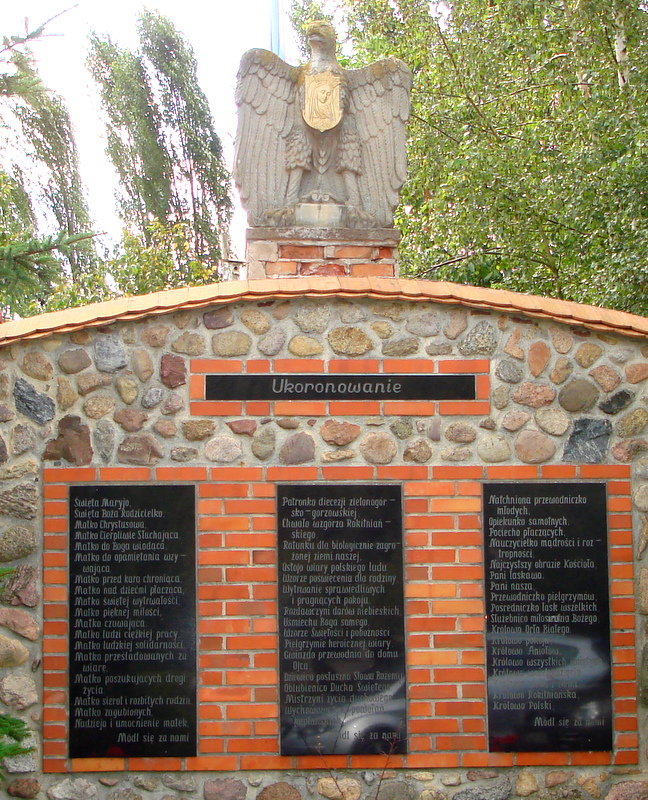 Rokitno, ogrody sanktuarium, litania do MB Rokitniańskiej